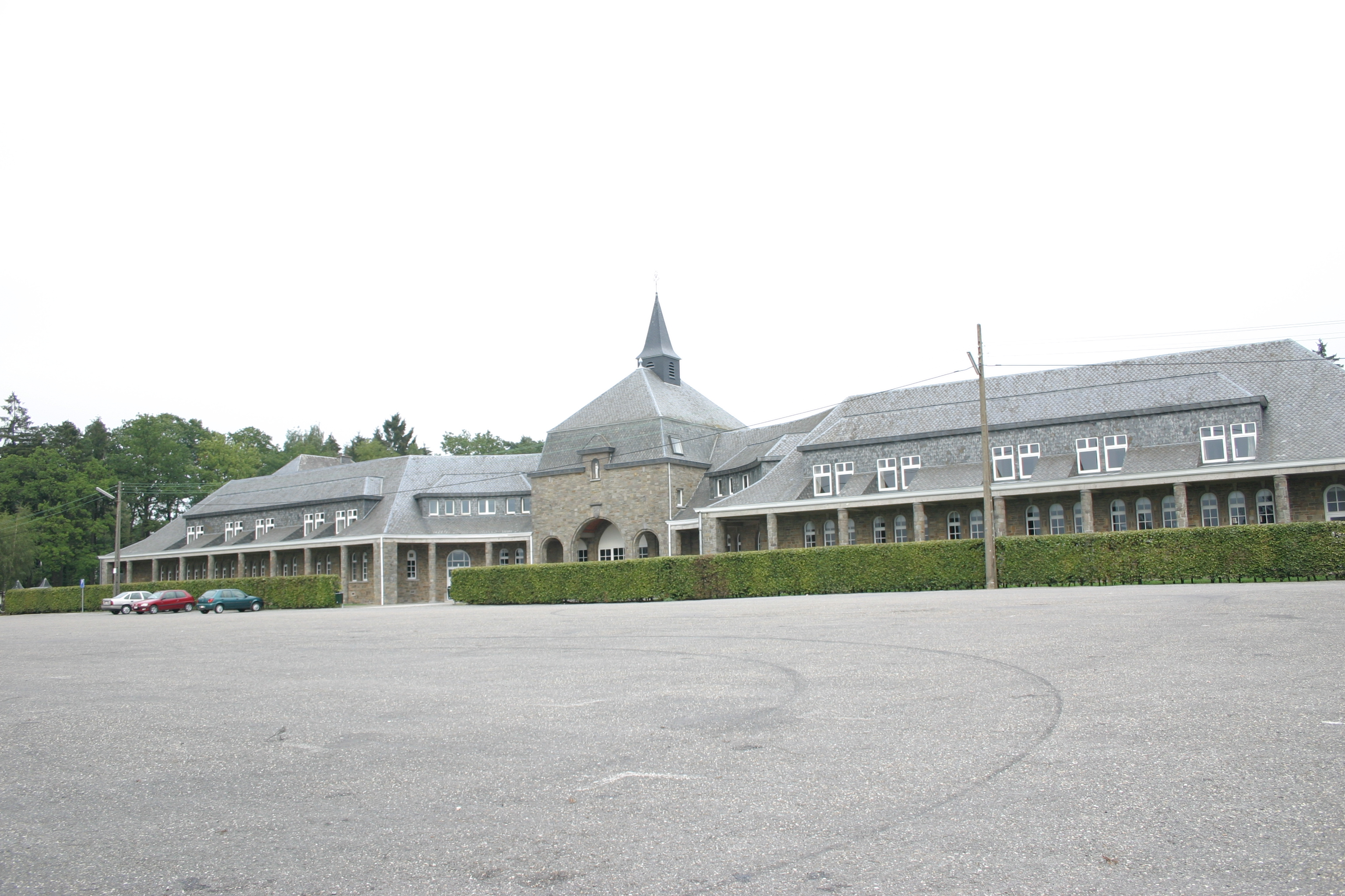 Gebai vun der Hospitalté Notre-Dame.